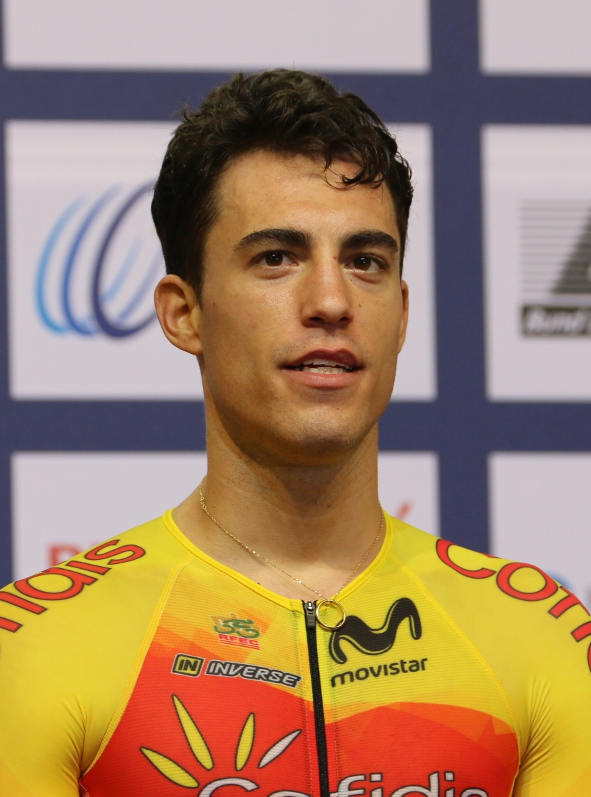 Albert Torres, Europameister im Omnium